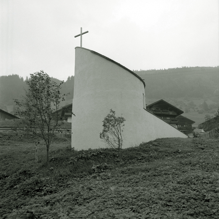 Kapelle Innerberg, Finkenberg (A) This media shows the remarkable cultural object in the Austrian state of Tyrol listed by the Tyrolean Art Cadastre with the ID 16281. (on tirisMaps, pdf, more images on Commons)